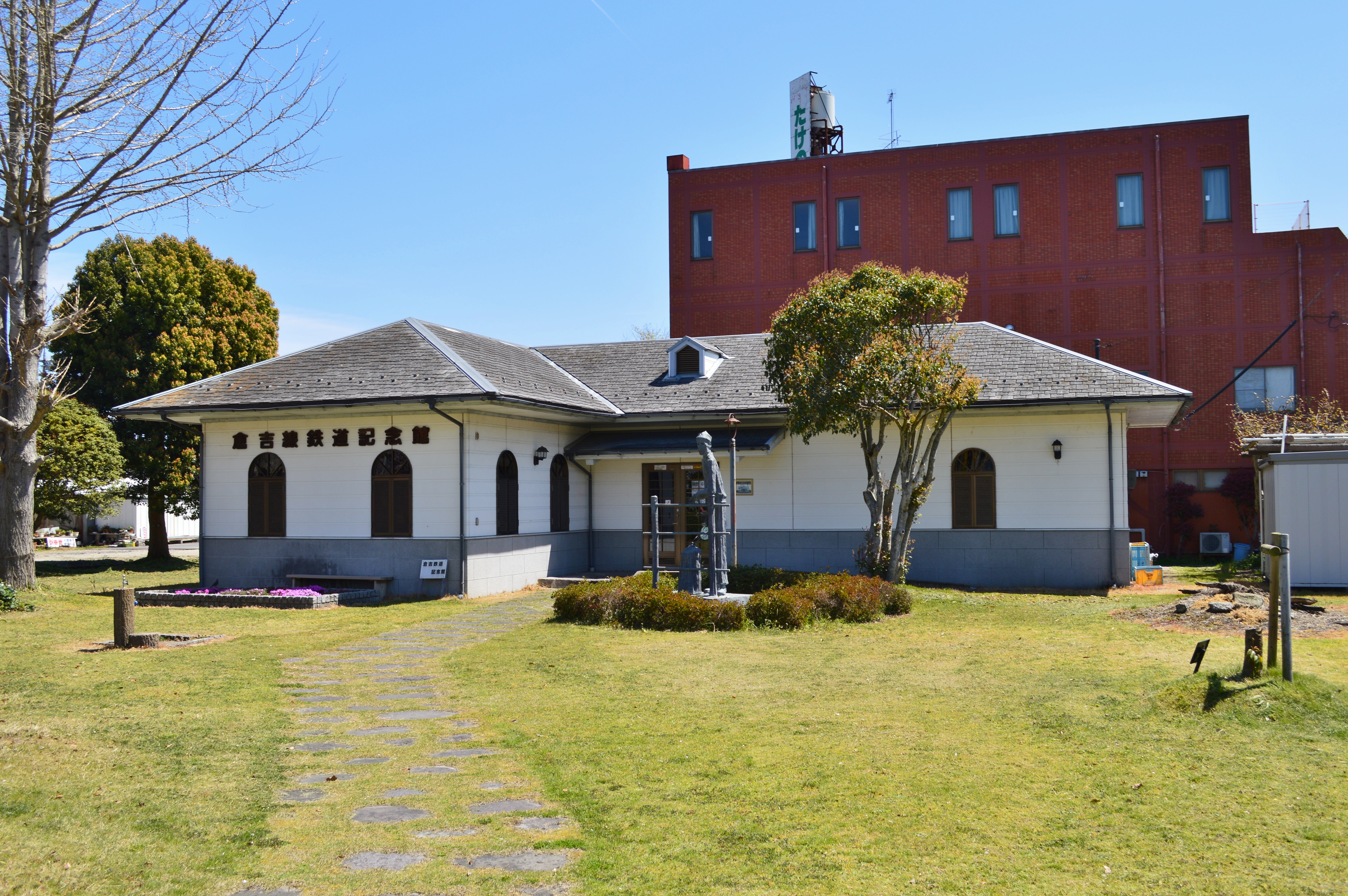 倉吉線鉄道記念館 外観 Nikon D3200